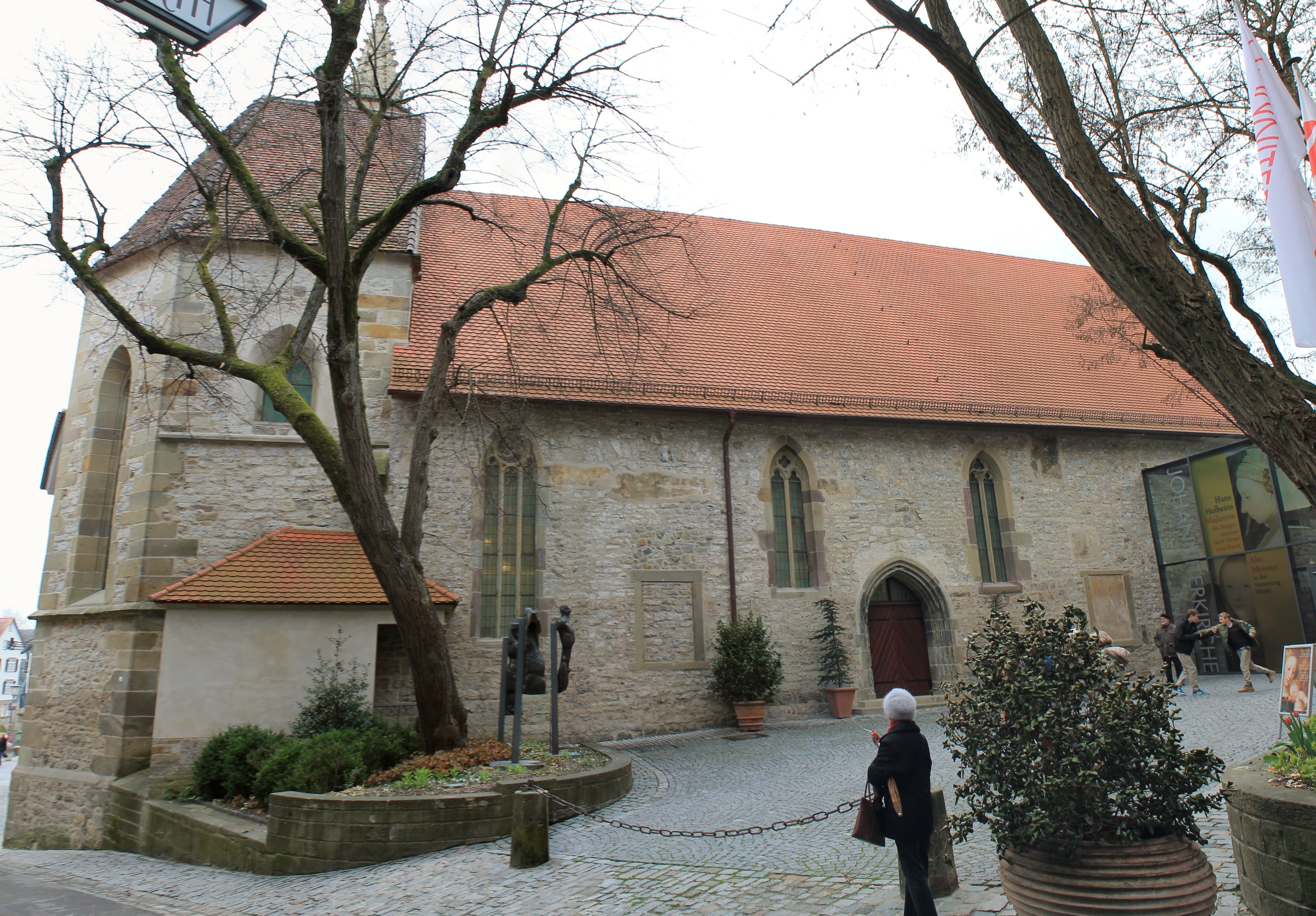 Eglise-musée "Johanniterkirche" Schwäbisch Hall